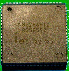 Foto amatoriale sull'intel 80286 fatta da me su un mio vecchio pc